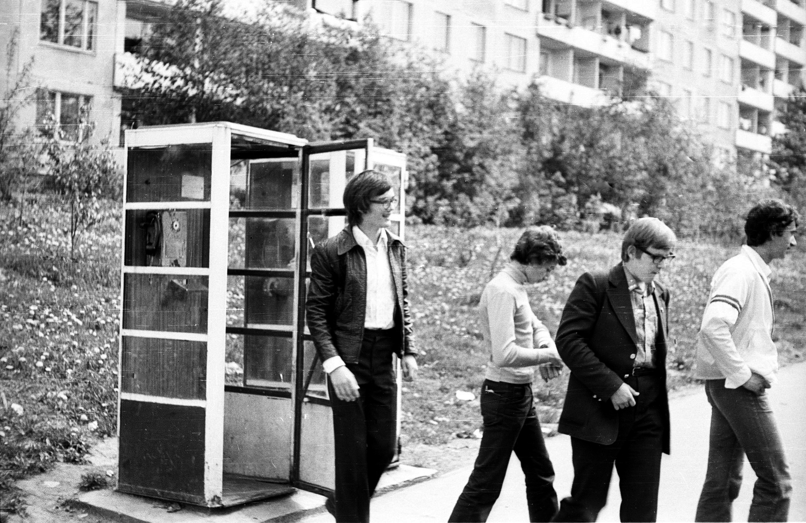 «Последний звонок» в 856-й школе. Москва, 1981 г. (Геннадий Геннадьевич Овчаренко, Геннадий Блинов, Сергей Загладкин и Виктор Миклишанский)